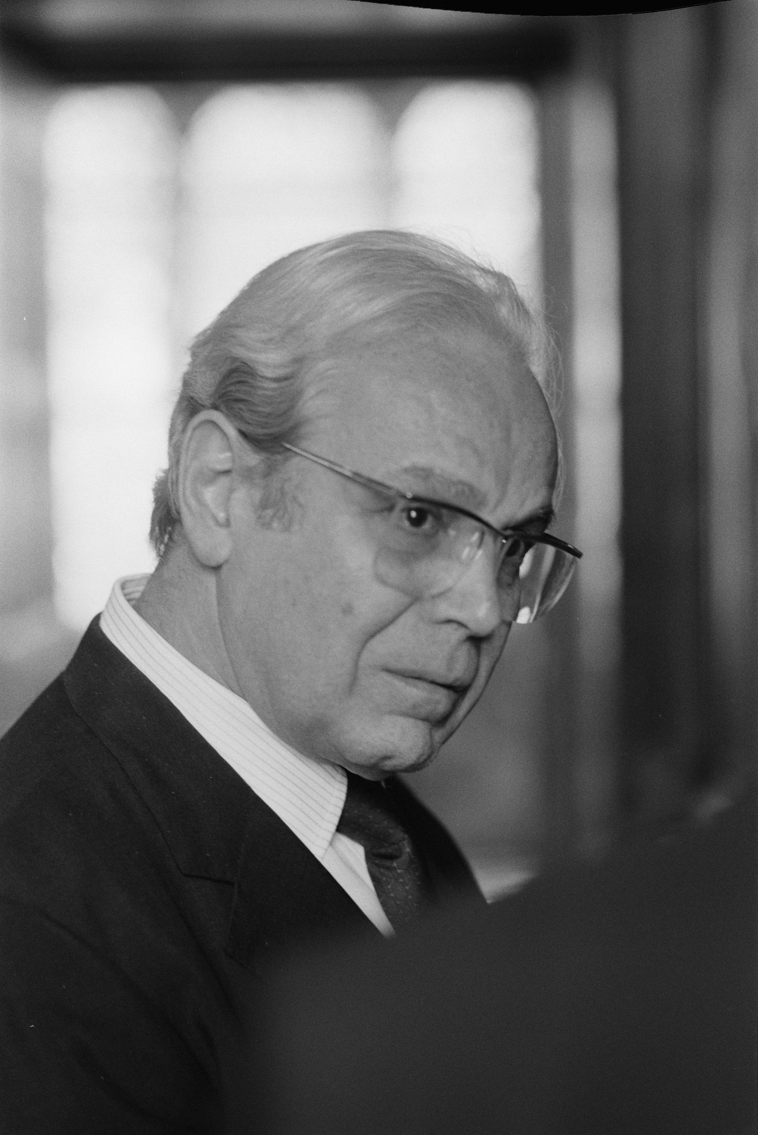 Collectie / Archief : Fotocollectie Anefo Reportage / Serie : [ onbekend ] Beschrijving : VN-secretaris-generaal Perez de Cuellar , kop Datum : 5 september 1988 Persoonsnaam : Pérez de Cuellar, Javier Fotograaf : Croes, Rob C. / Anefo Auteursrechthebbende : Nationaal Archief Materiaalsoort : Negatief (zwart/wit) Nummer archiefinventaris : bekijk toegang 2.24.01.05 Bestanddeelnummer : 934-3065